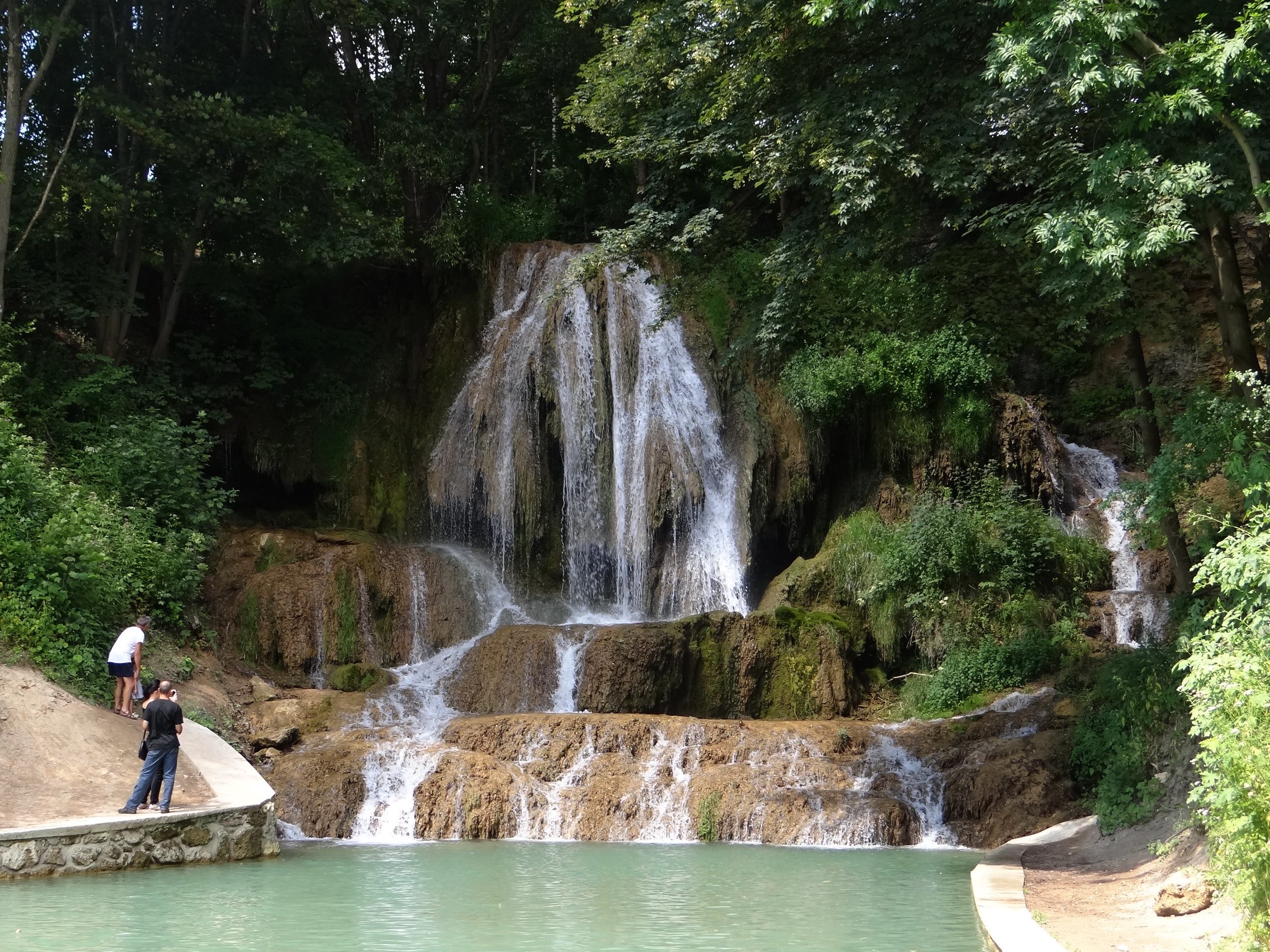 Lúčanský vodopád